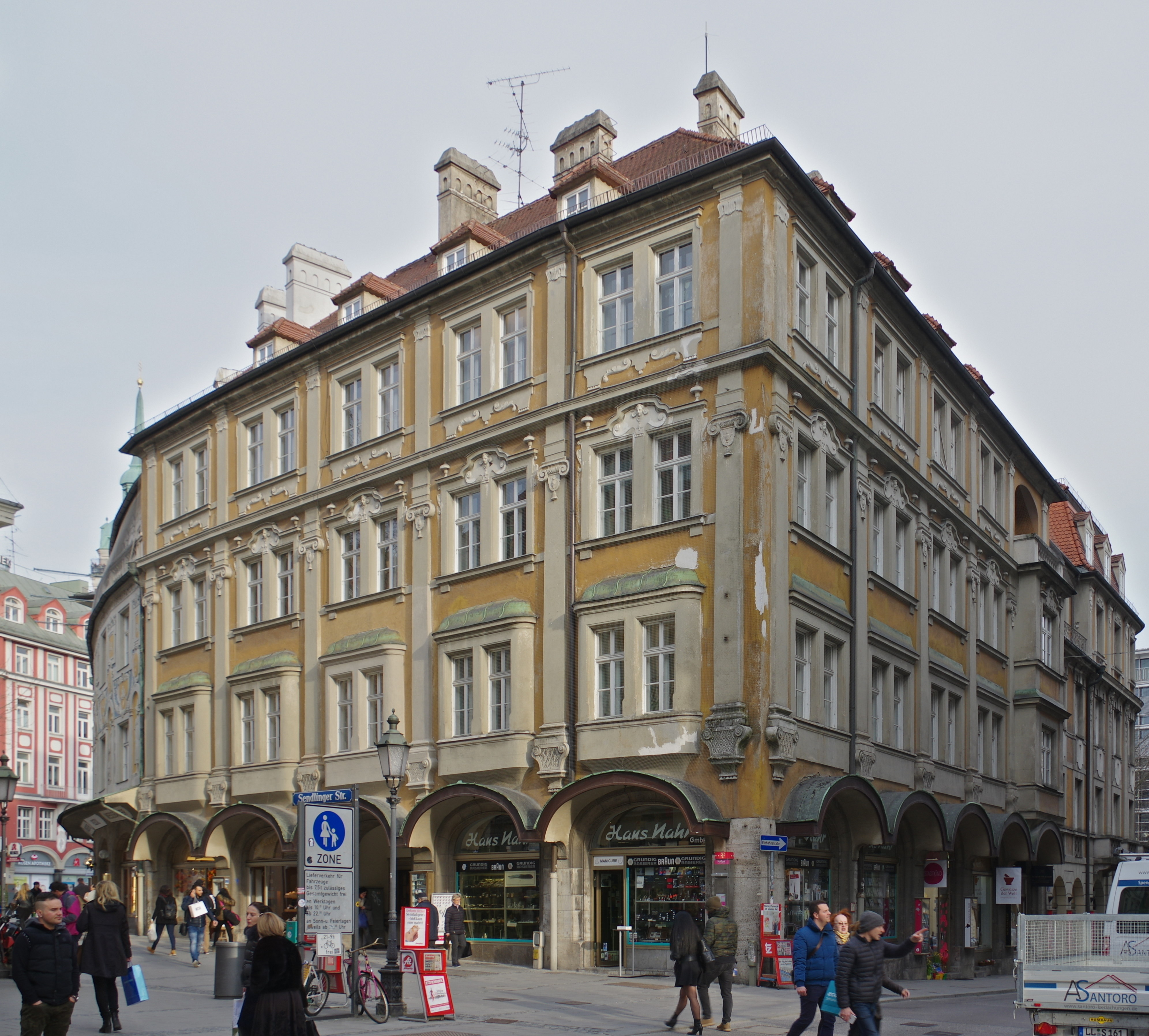 München, Sendlinger Straße 1, Ruffiniblock; Akten-Nr. D-1-62-000-5846